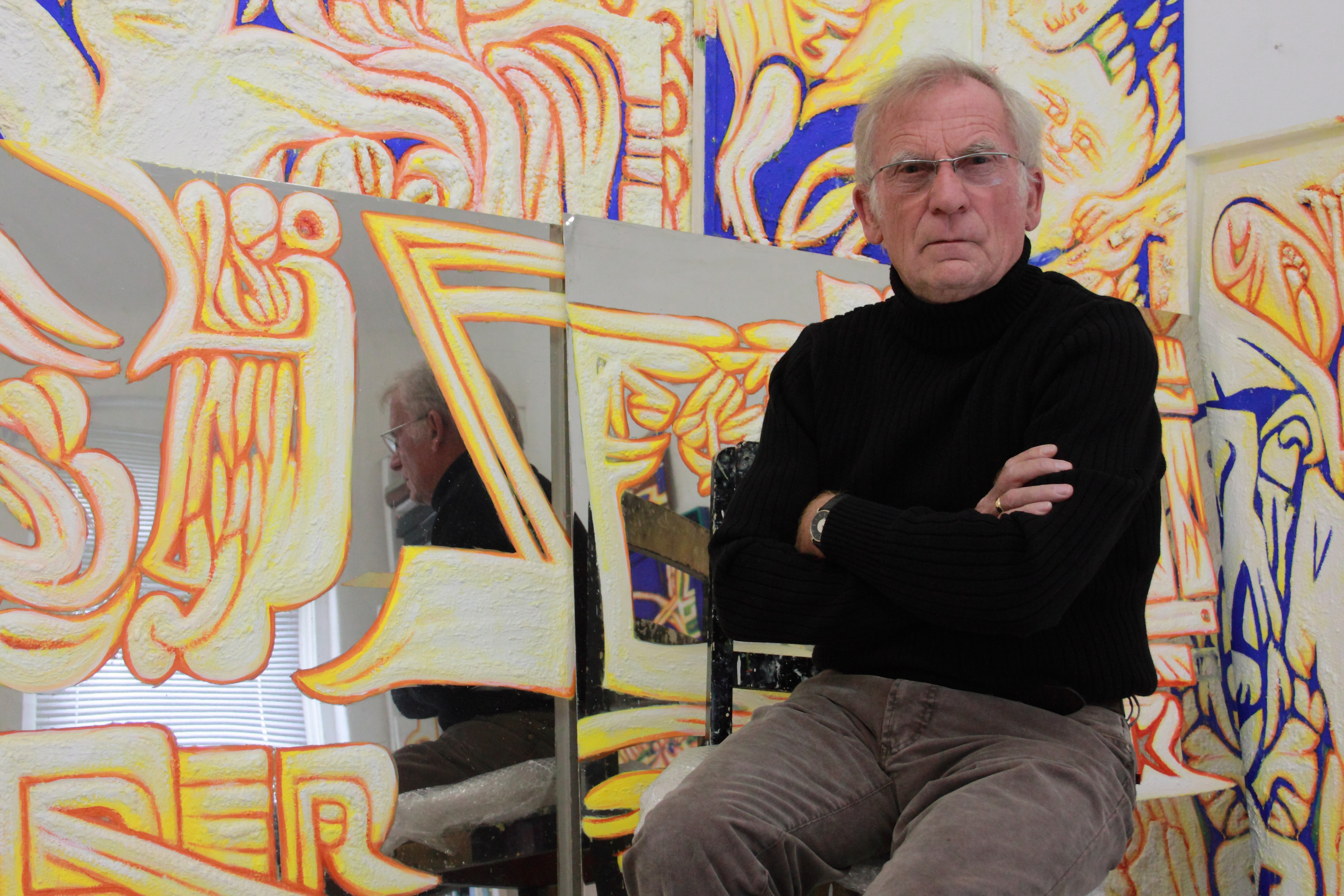 Maler